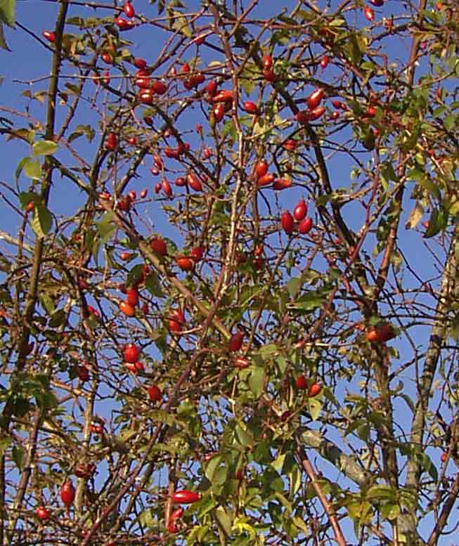 Hagebutten der Hundsrose (rosa canina)